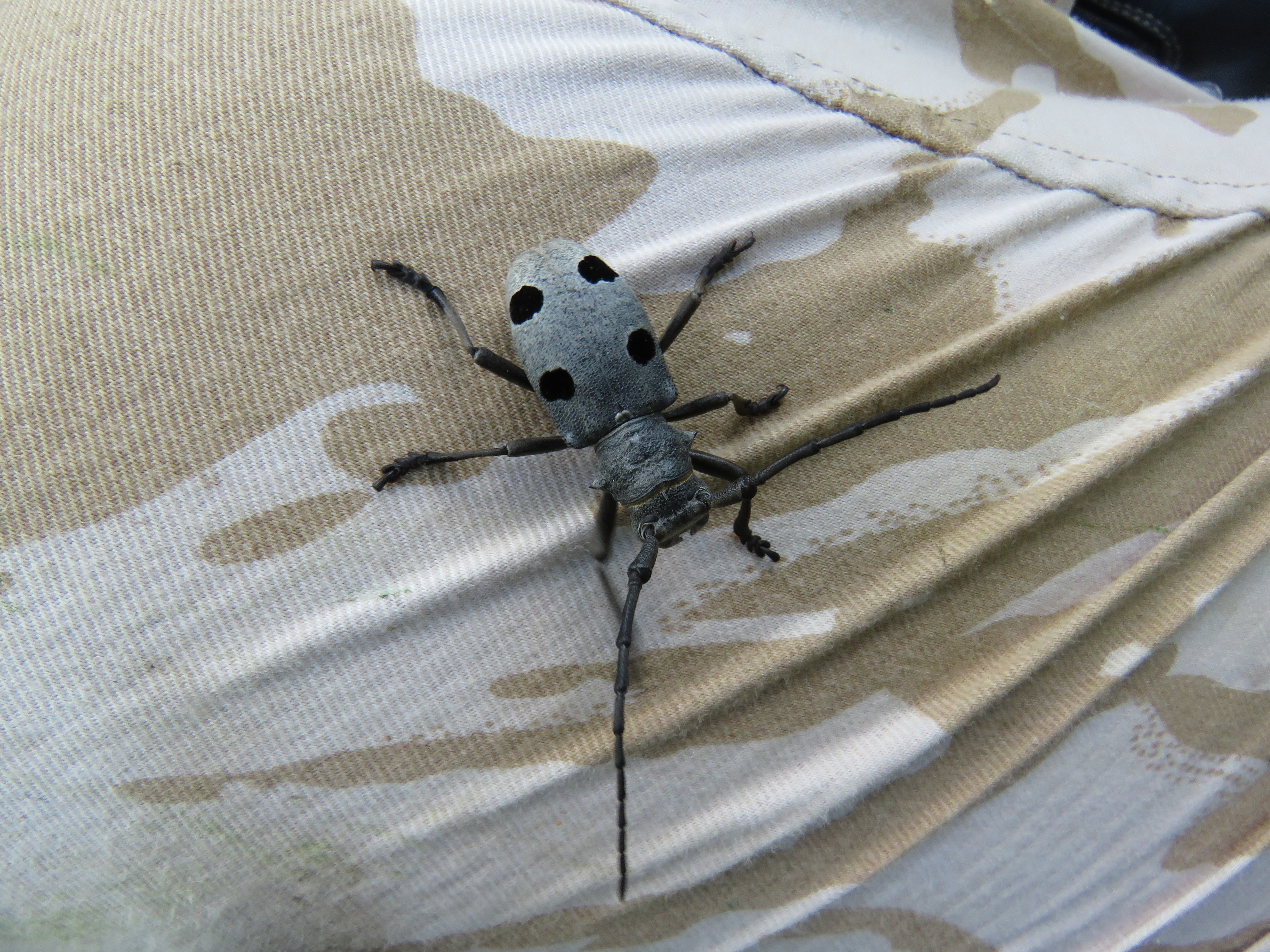 Srpski (latinica): Vlasinska visorava i Vlasinsko jezero, Srbija